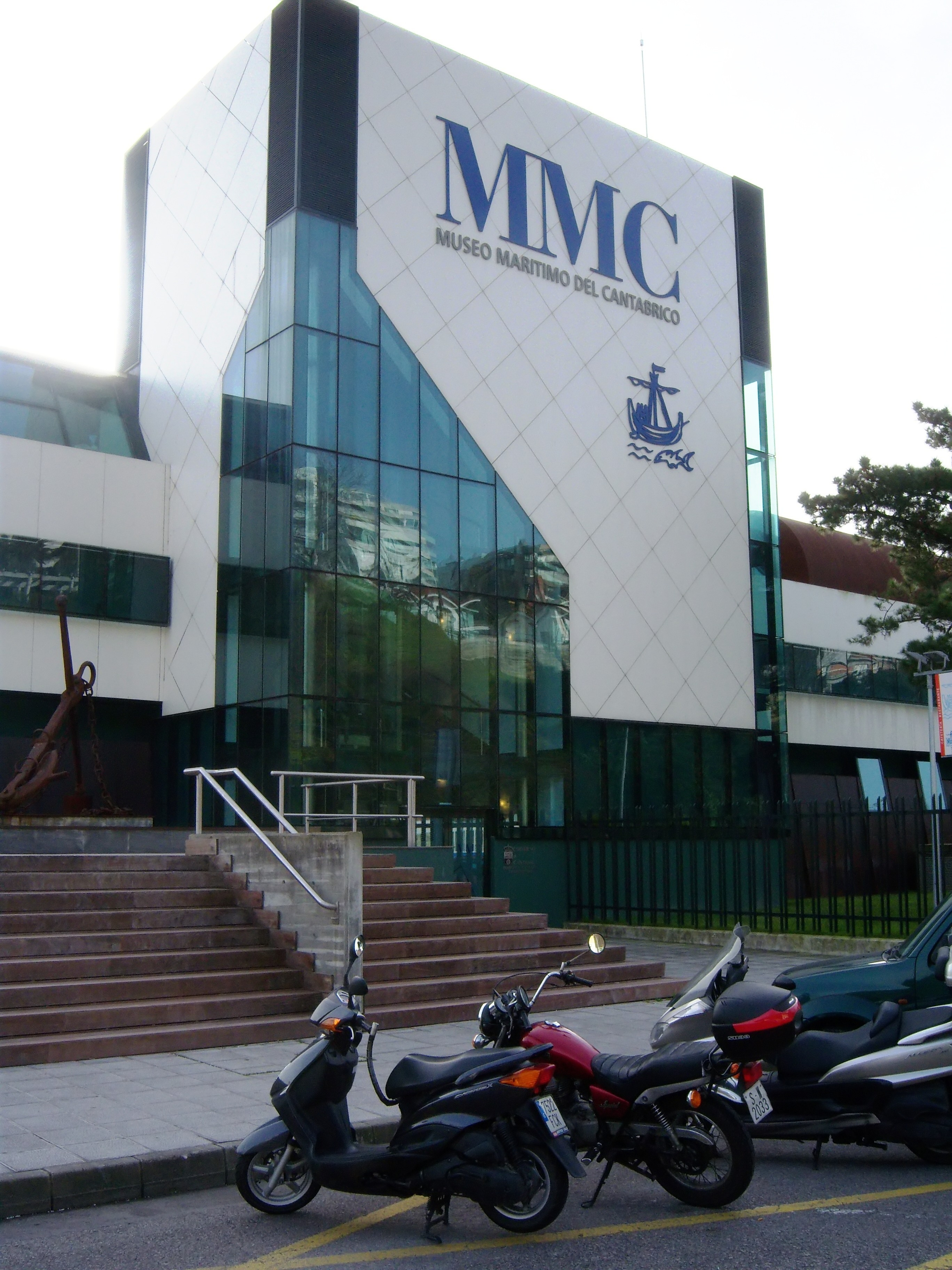 Museo Marítimo del Cantábrico, en Santander (Cantabria, España)